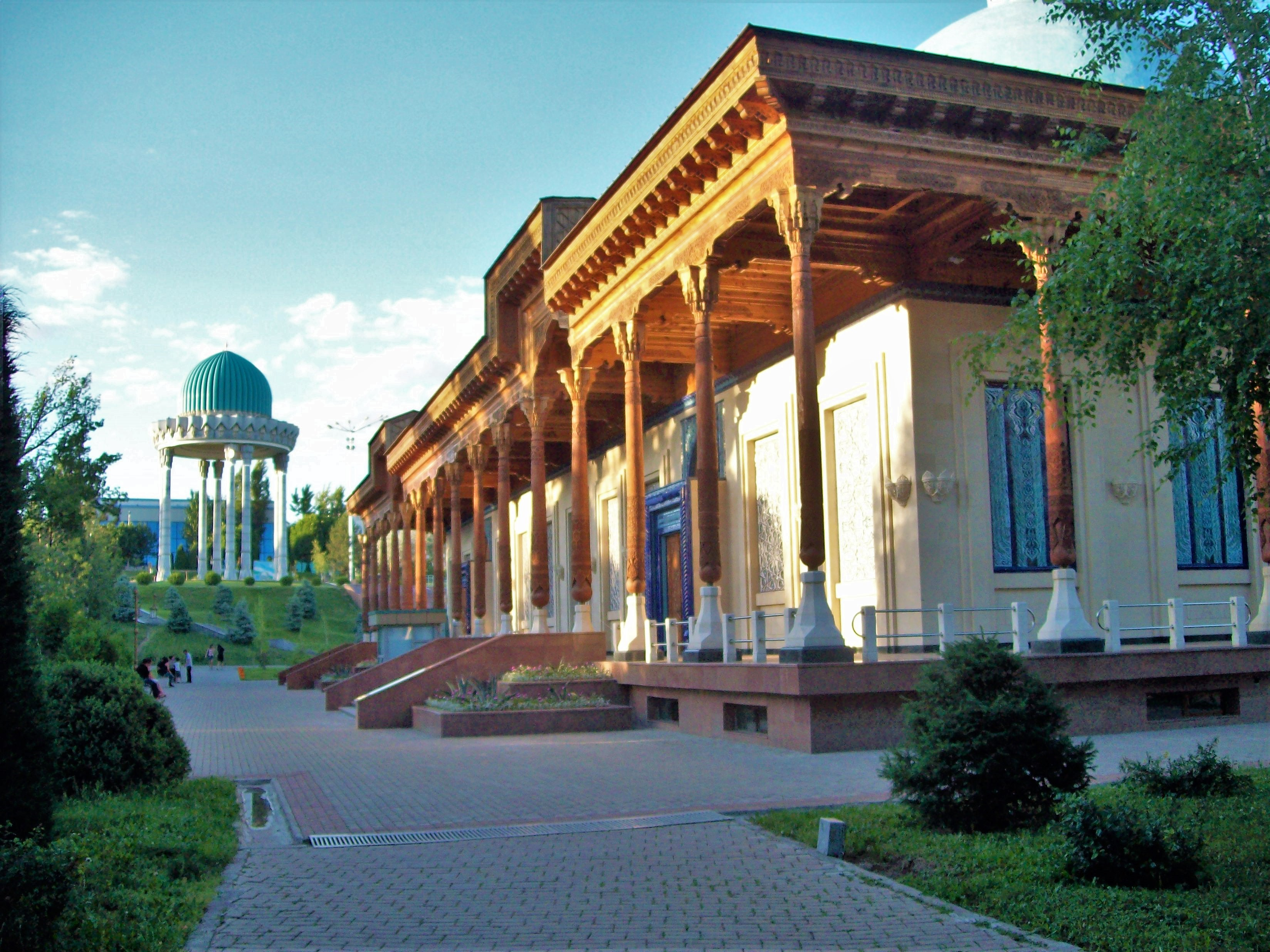 Музей репресированным в Сталинские времена в площади Памяти и почести (Шахидлар майдони), Ташкент